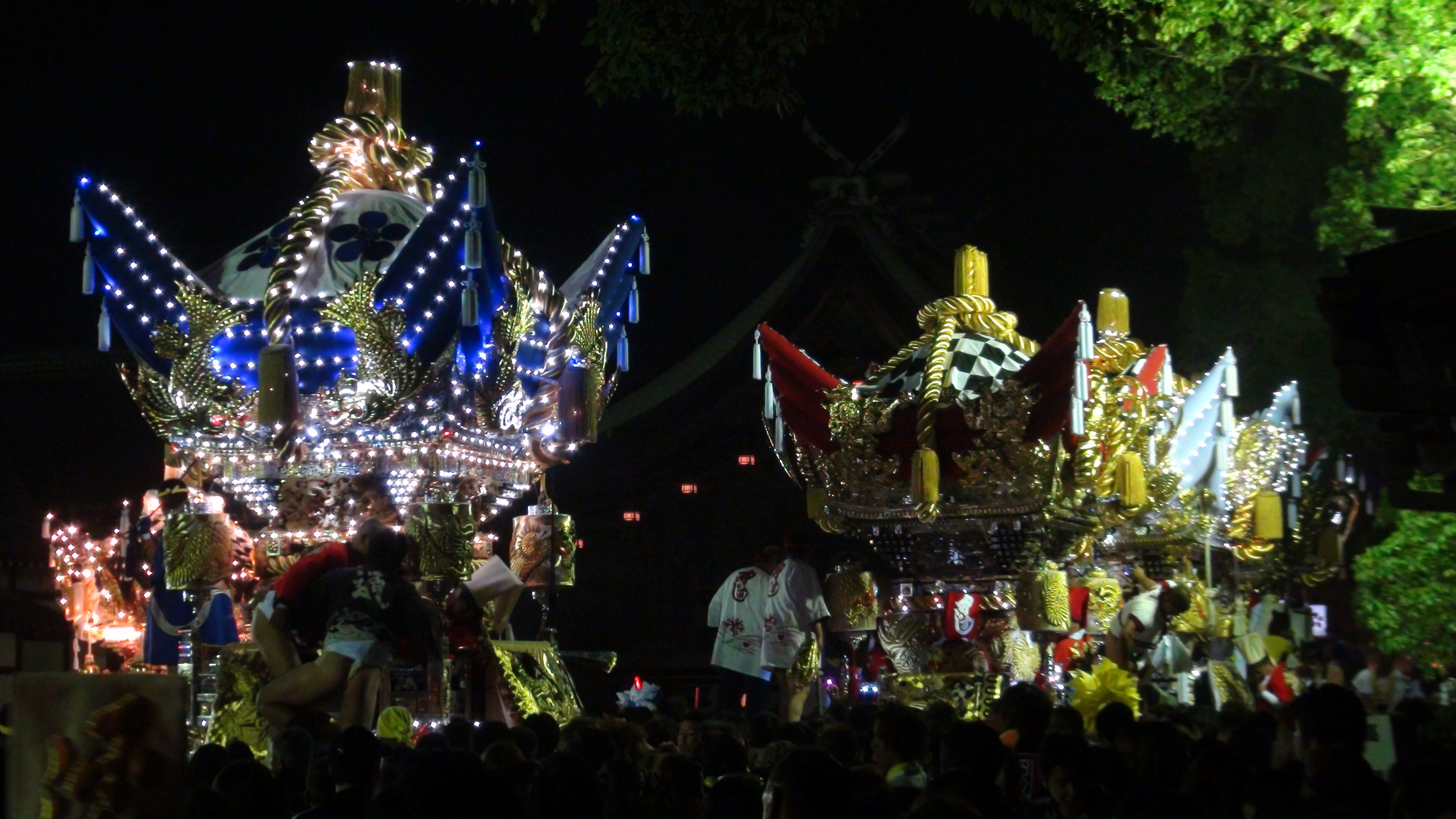 曽根天満宮 秋季例大祭 （2010年10月）